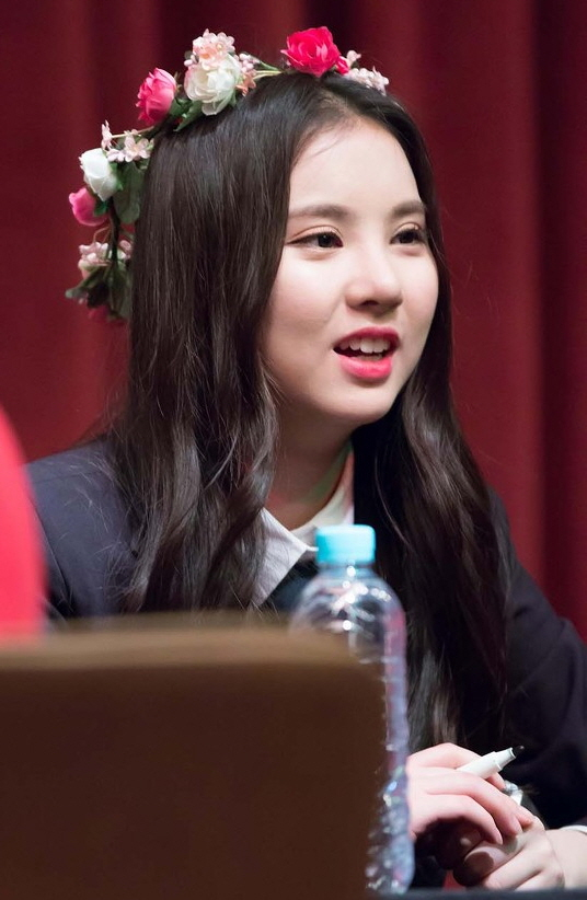 160326 대전 팬싸인회 소원,은하 직찍